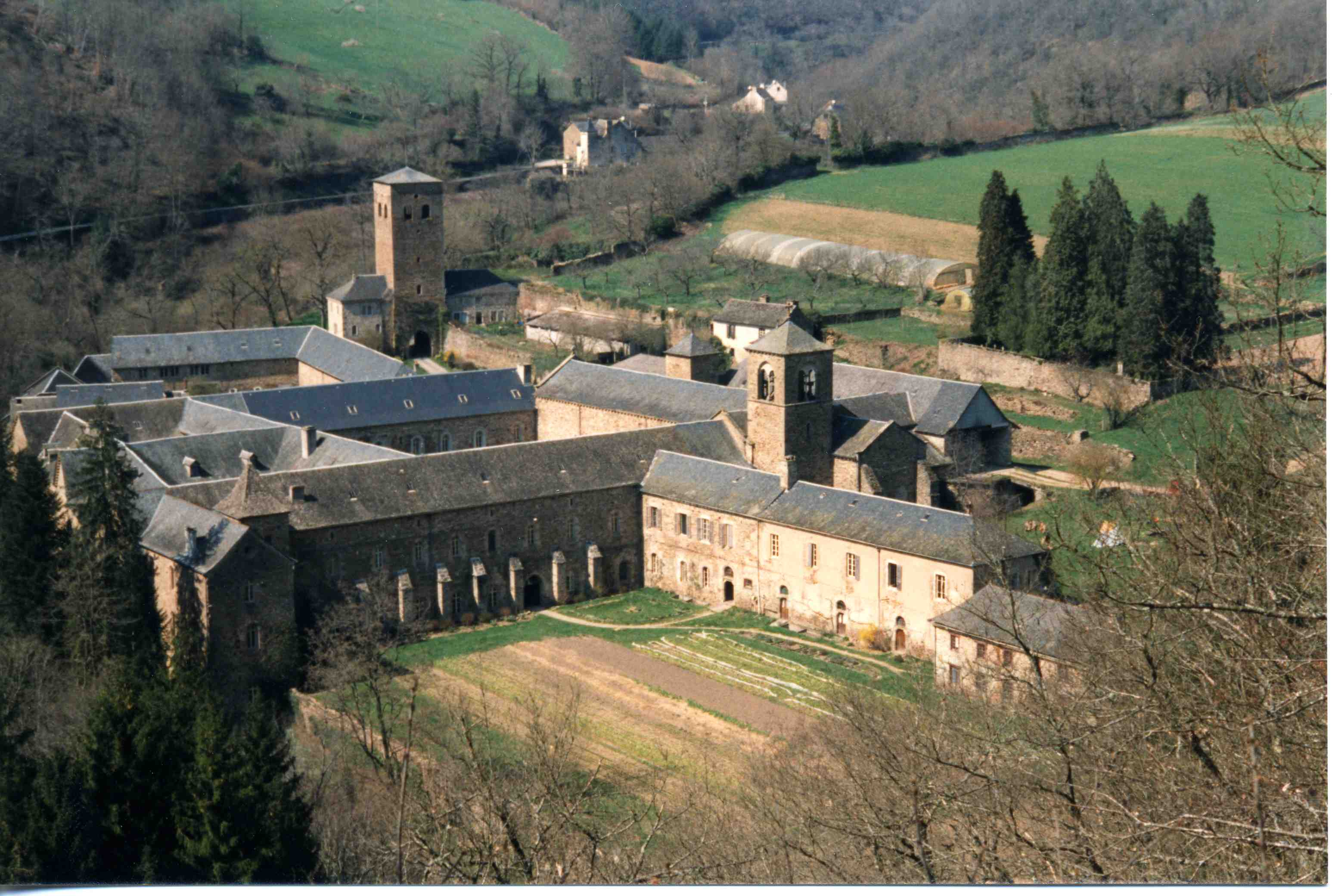 Abbaye de Bonnecombe, du temps de la communauté de l'Arche.